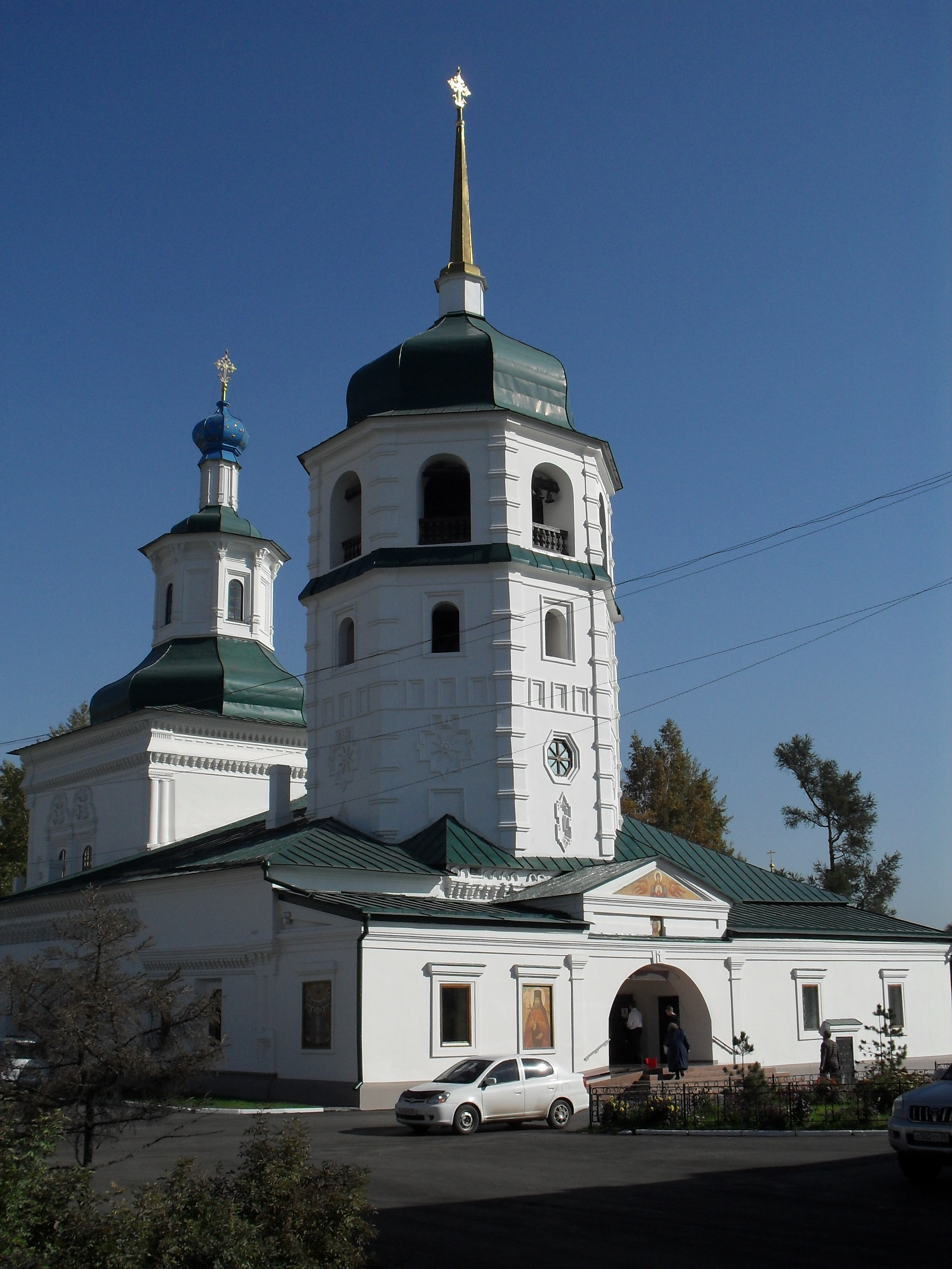 Иркутск. Знаменский женский монастырь. 1757 г. Вид с юго-западной стороны.